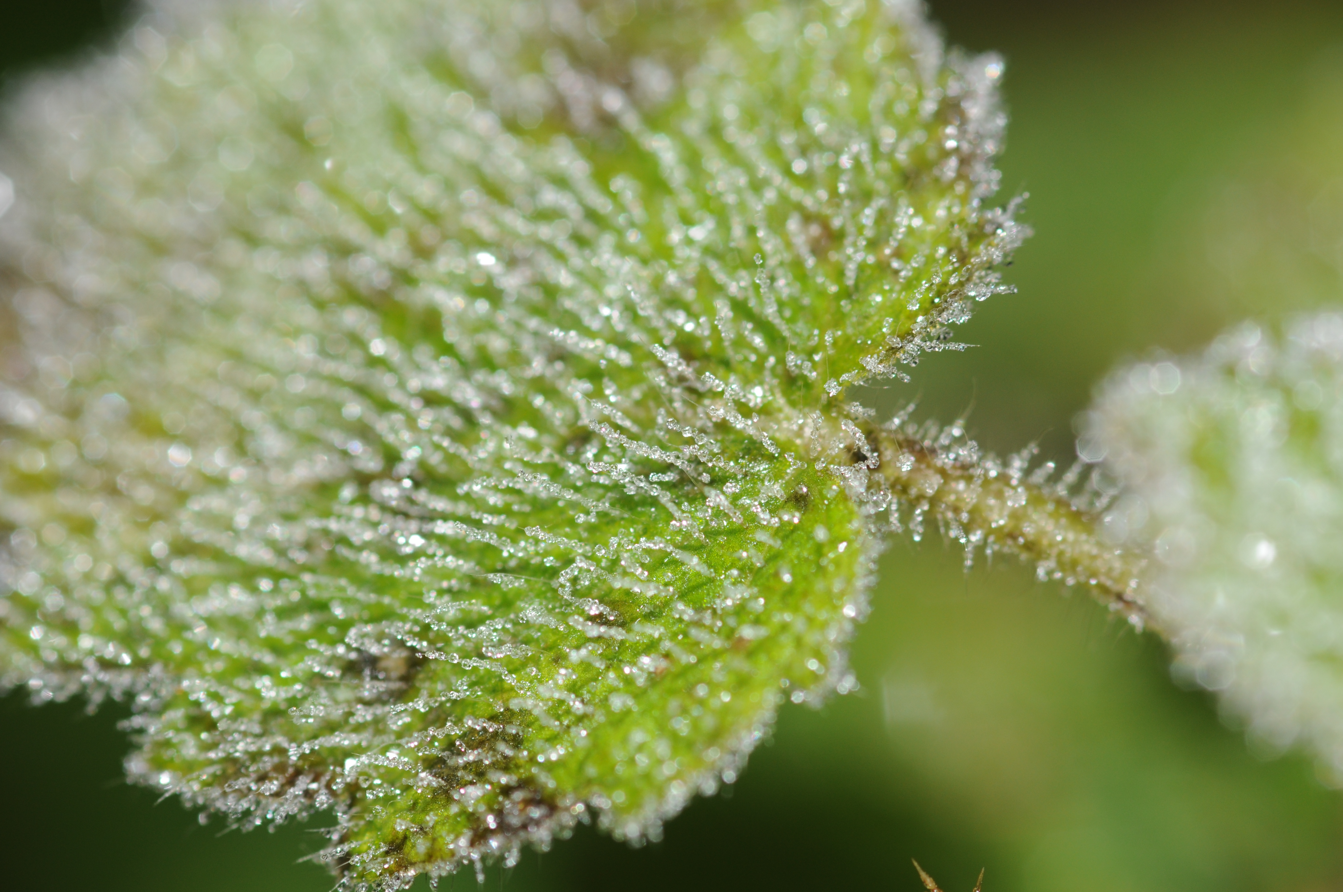 Givre sur une feuille.